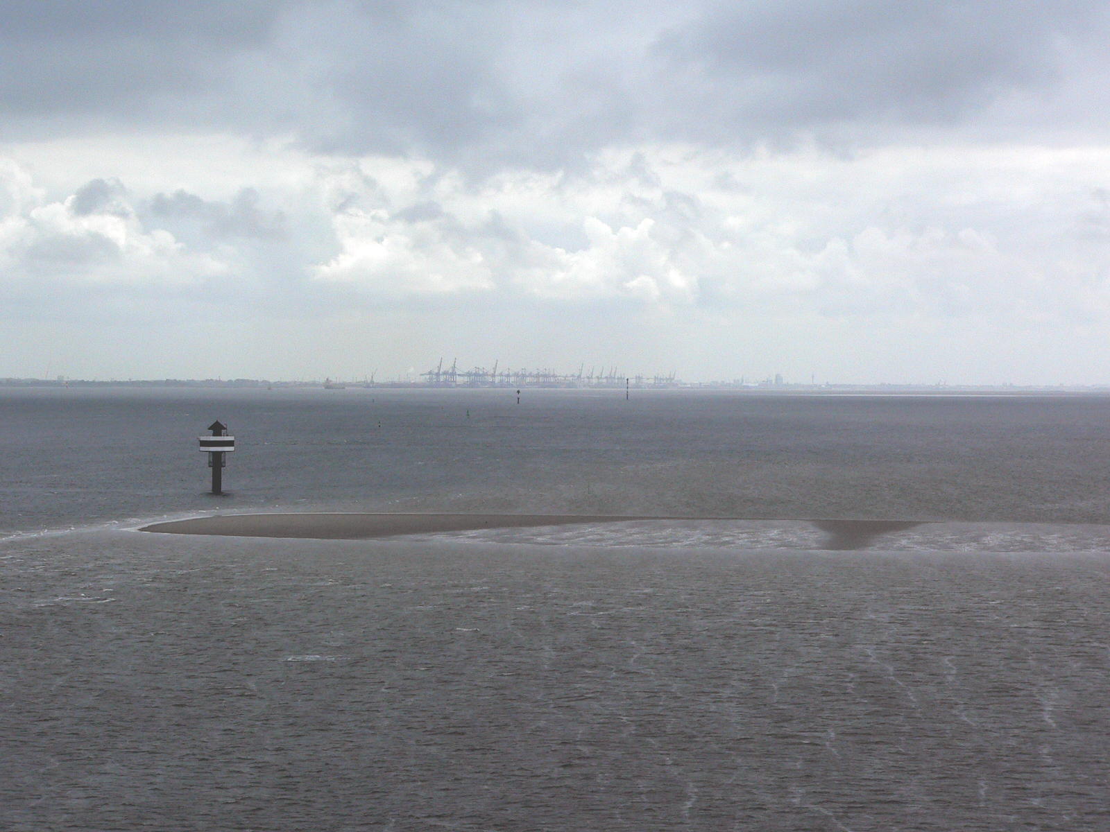 Wesermündung vor Bremerhaven, links das Langlütjen Unterfeuer, am Horizont der Container-Terminal Bremerhaven